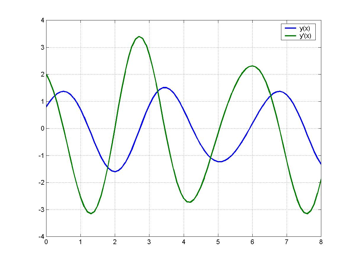 Решение уравнения методом Рунге-Кутты